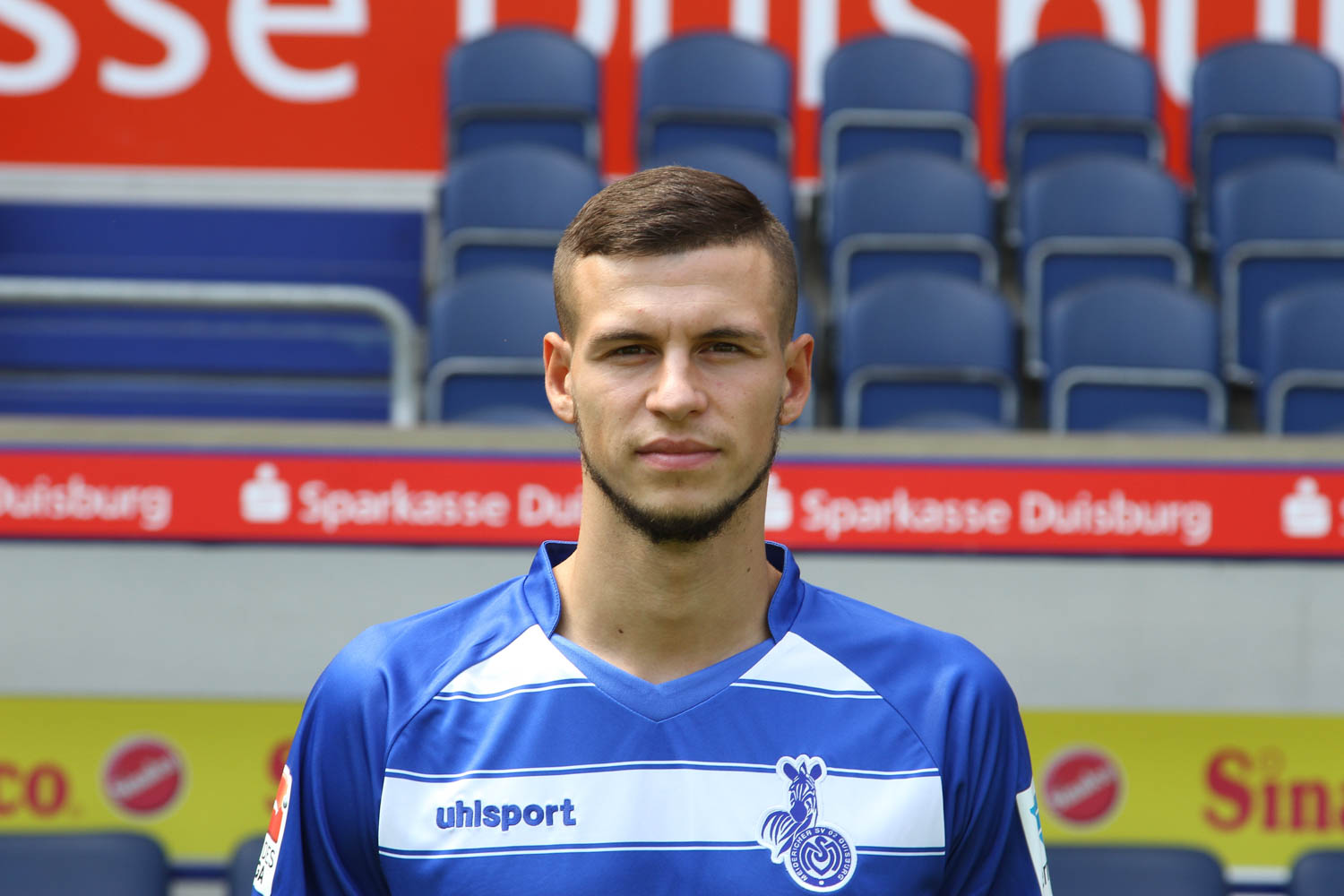 Andreas Wiegel 2015